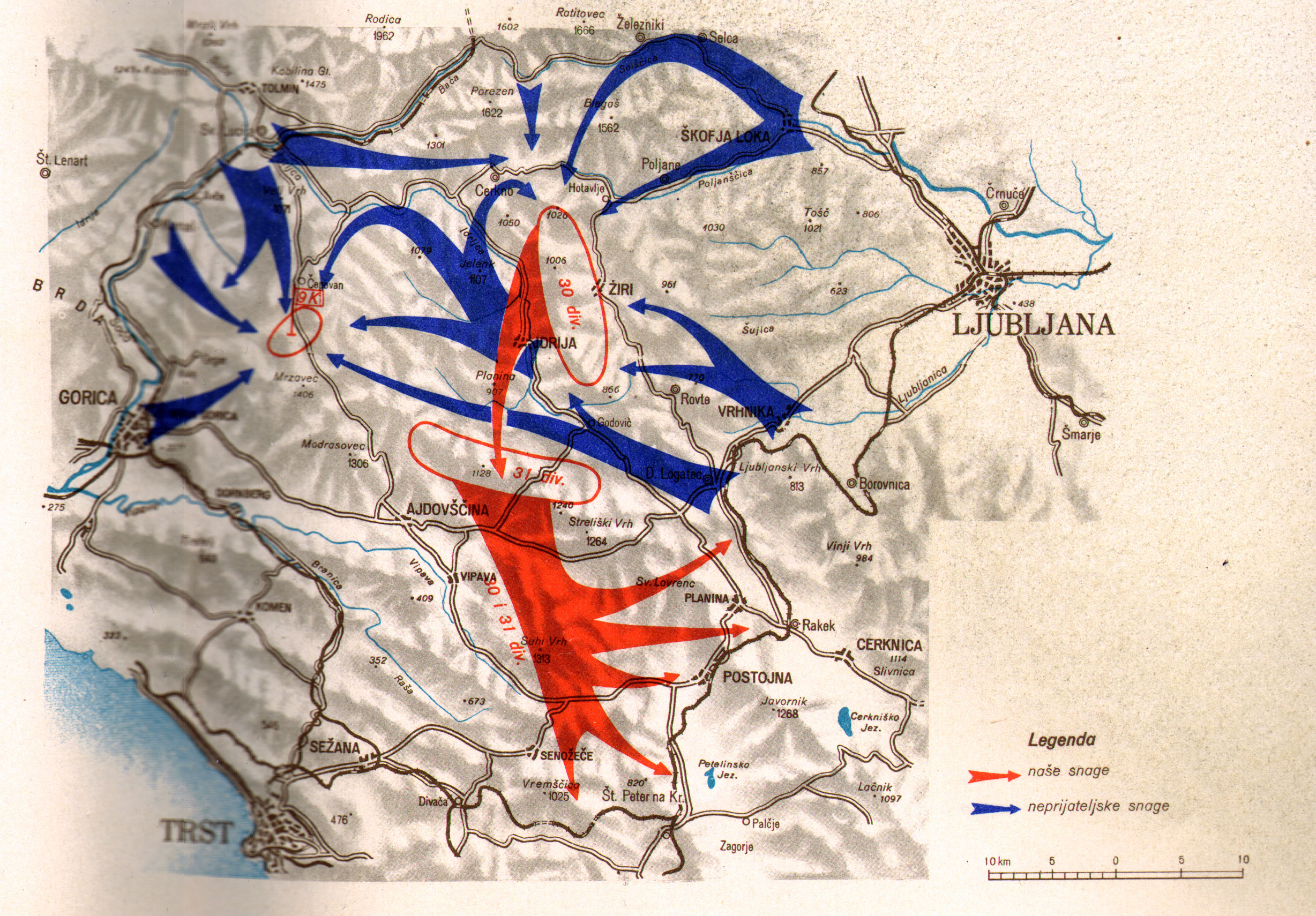 Srpskohrvatski / српскохрватски: Neprijateljska ofanziva na 9 korpus u Gorenjskoj i Slov. primorju i protivofanzivna dejstva Korpusa na železničku prugu Ljubljana-Trst (aprila 1944 godine)